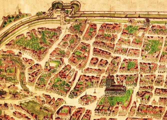 Plan der Stadt Ulm (Ausschnitt) aus dem Jahre 1597 von Philipp Renlin dem Älteren.